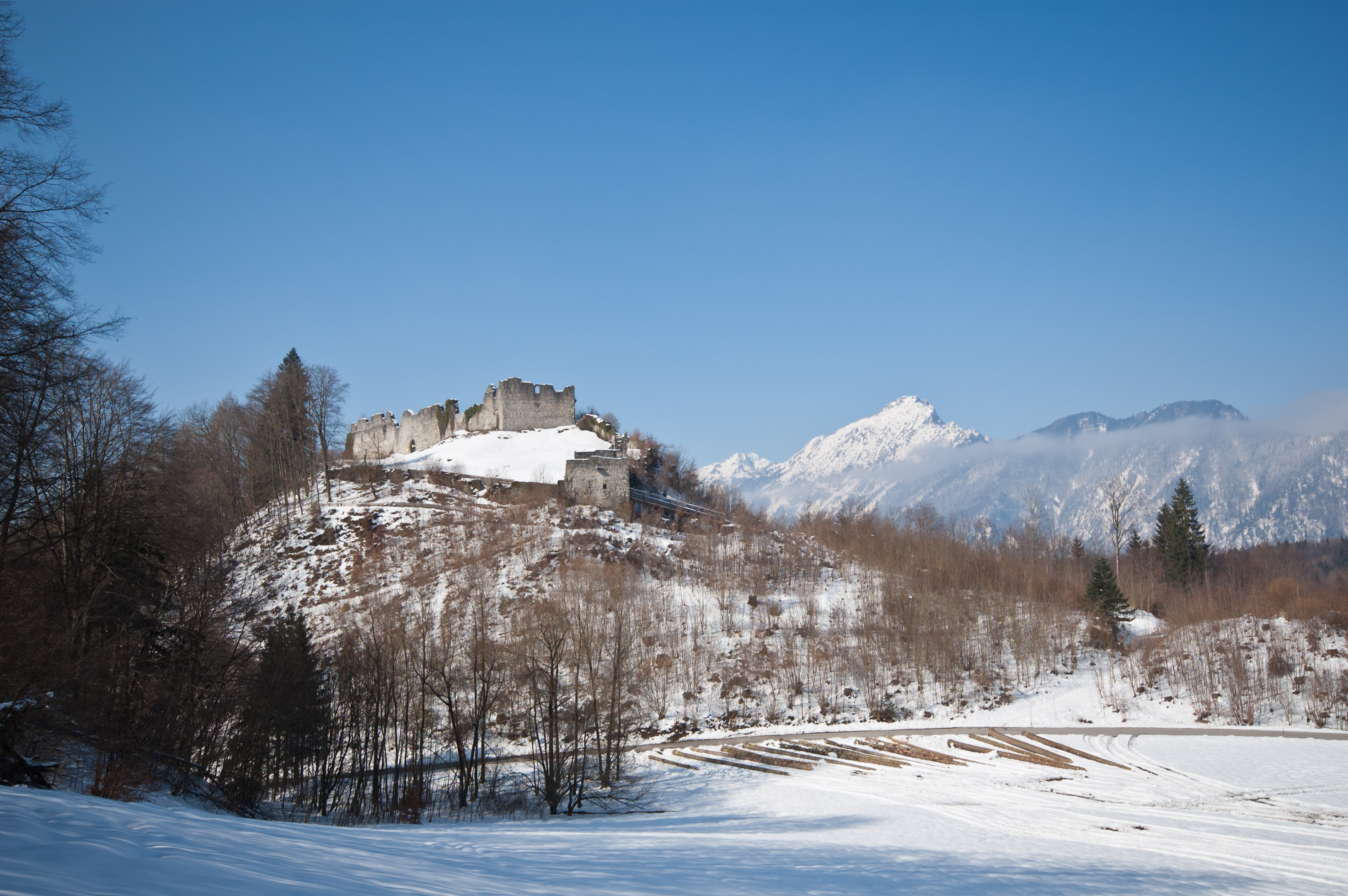 Ansicht der Plainburg vor den Reichenhaller Bergen